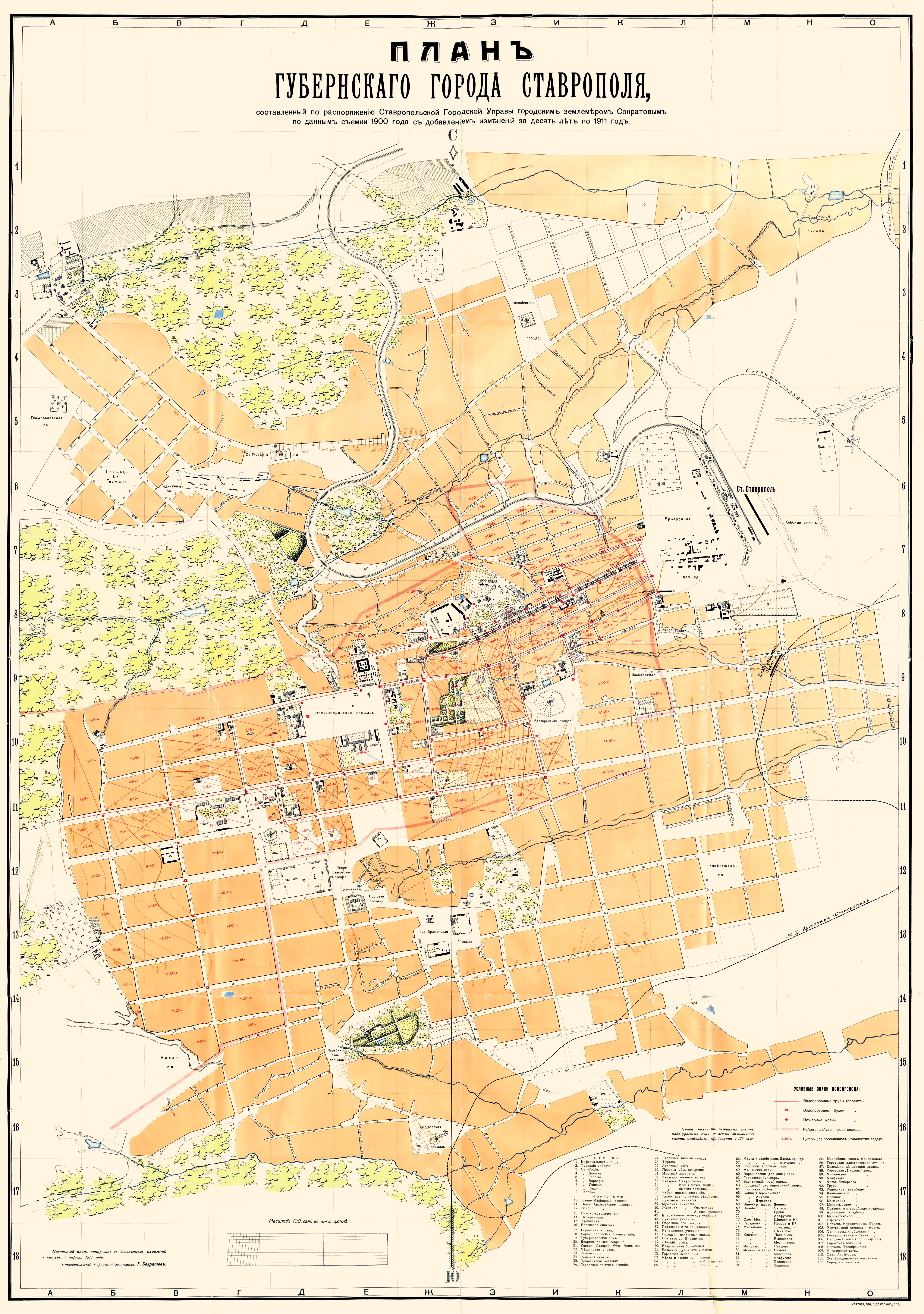 План губернского города Ставрополя, составленный по распоряжению Ставропольской городской управы городским землемером Г. Сократовым по данным съемки 1900 года с добавлением изменений за десять лет по 7 апреля 1911 год. Отпечатано в картографическом заведении Г. Де-Кельш в Петербурге. Масштаб 100 саженей в дюйме.